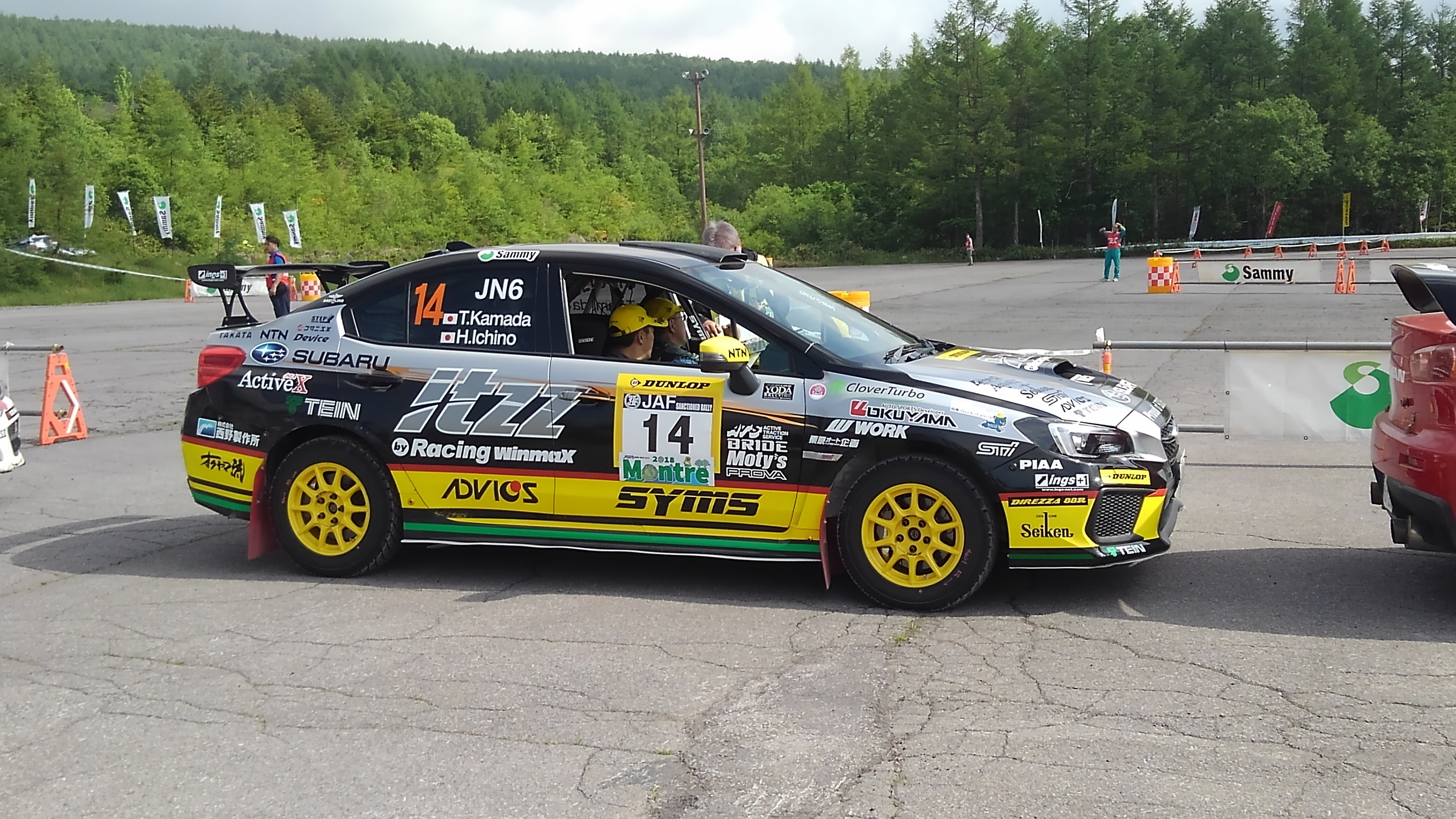 全日本ラリー選手権にて、鎌田卓麻/市野諮のWRX STI